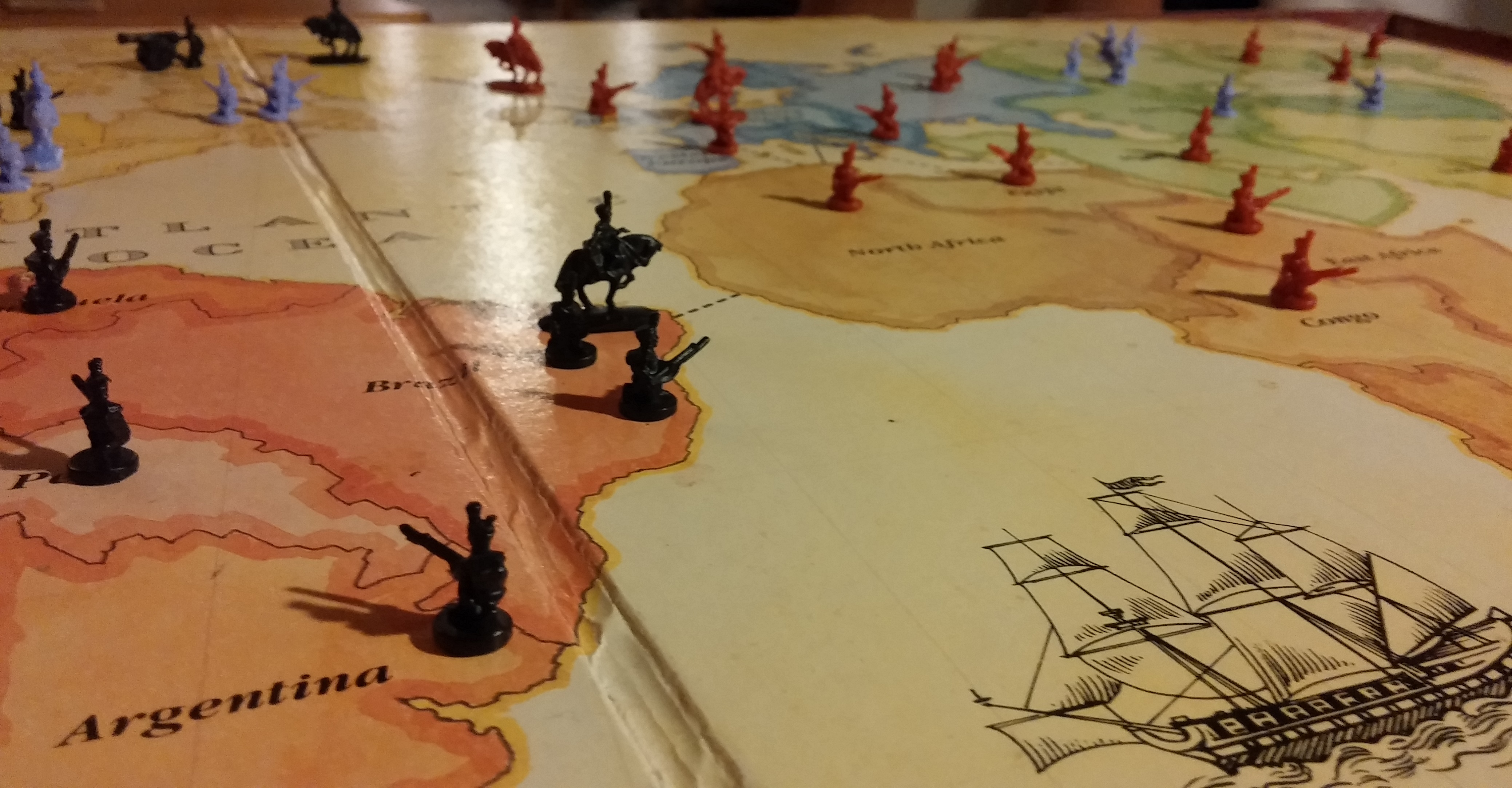 Het riskbord.